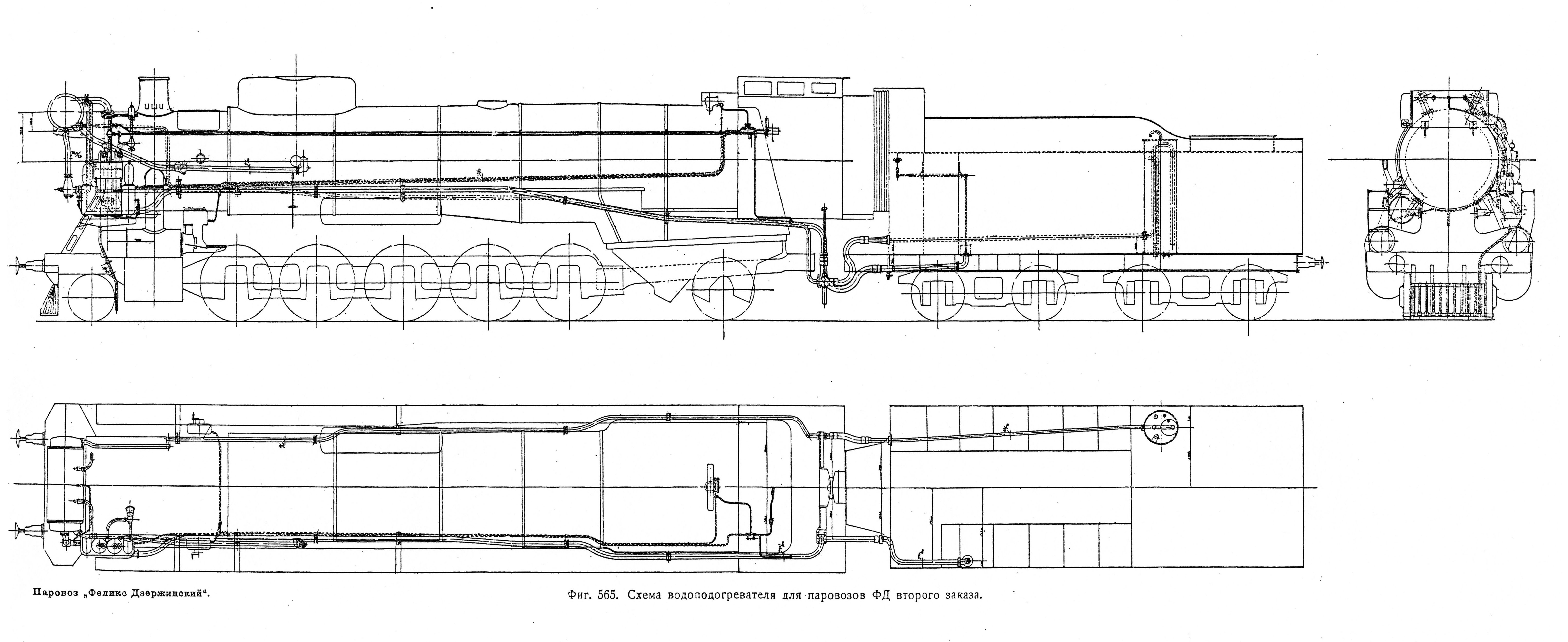 Проект установки водоподогревателя на паровоз ФД20-3.